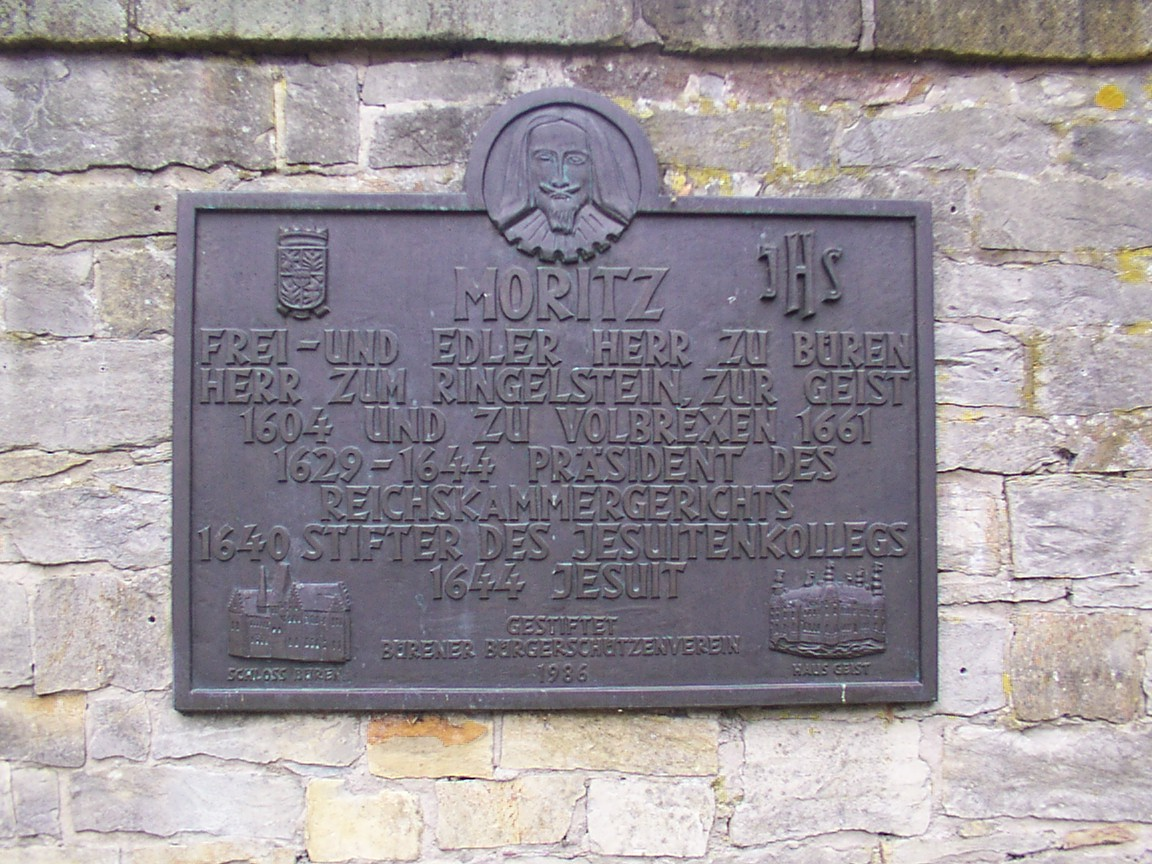 Büren (Westfalen): Gedenktafel Moritz von Büren